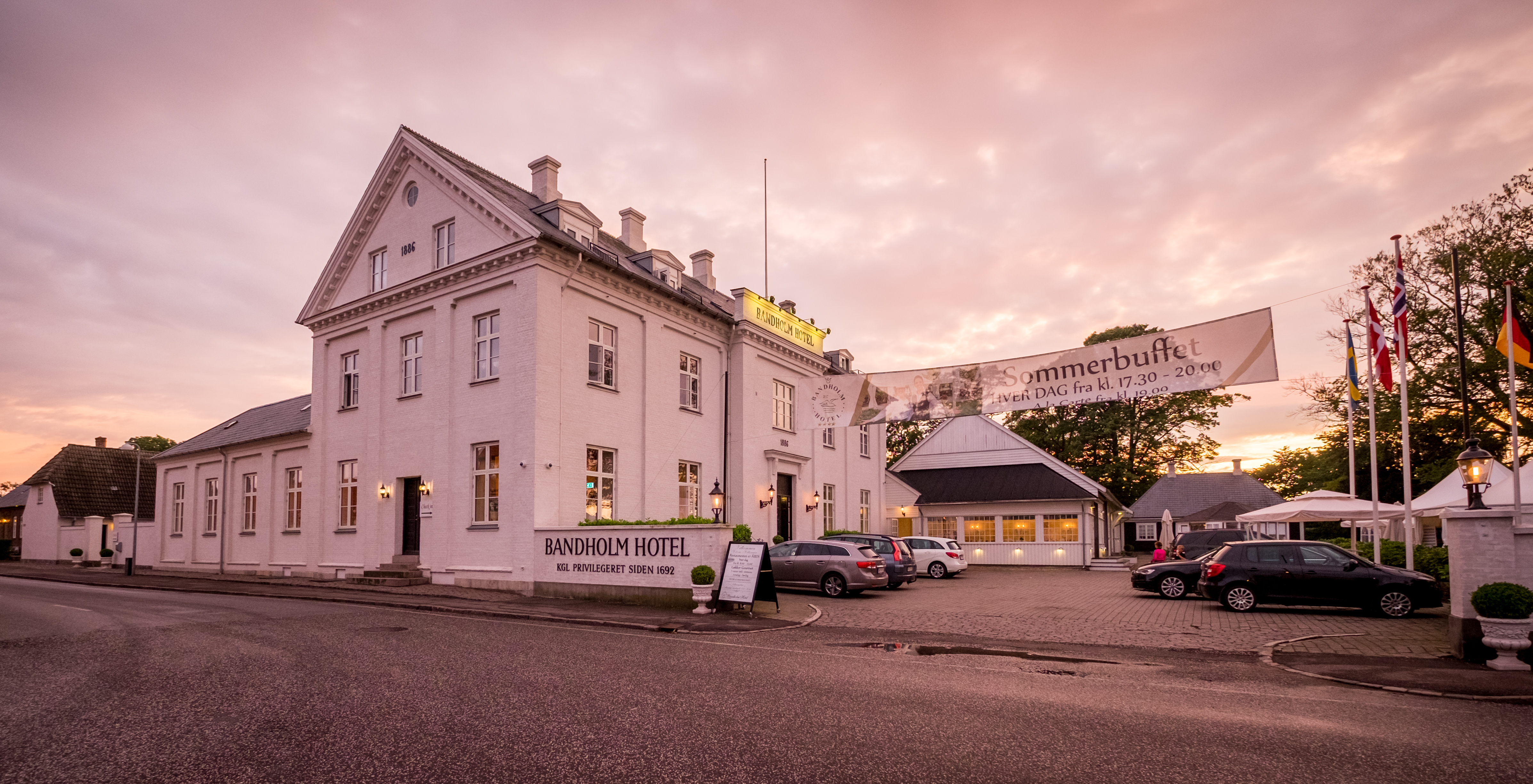 Bandholm Hotel in Falster, Denmark